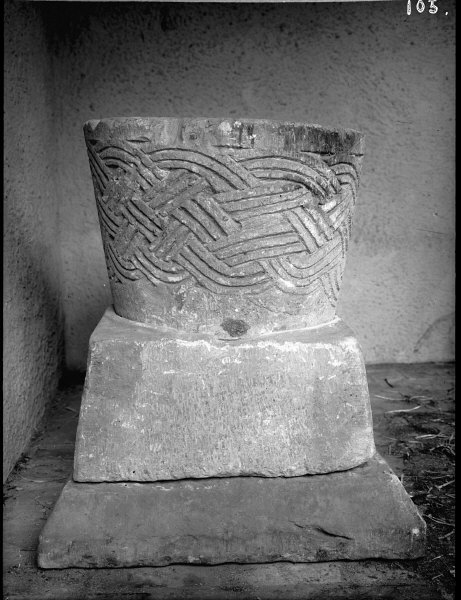 Dopfunt i sten. Omkr. 1100. Kategori: (04) DopfuntarDopfunt i sten. Omkr. 1100.